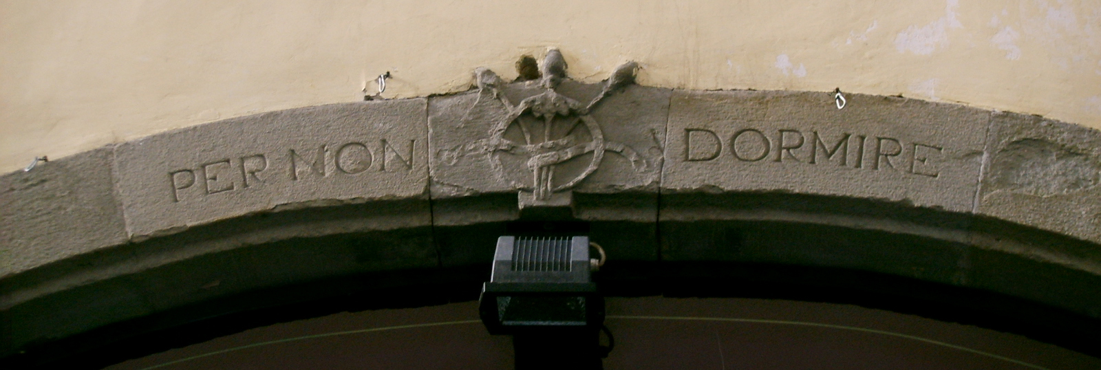 Via delle terme, motto e insegna bartolini salimbeni, per non dormire